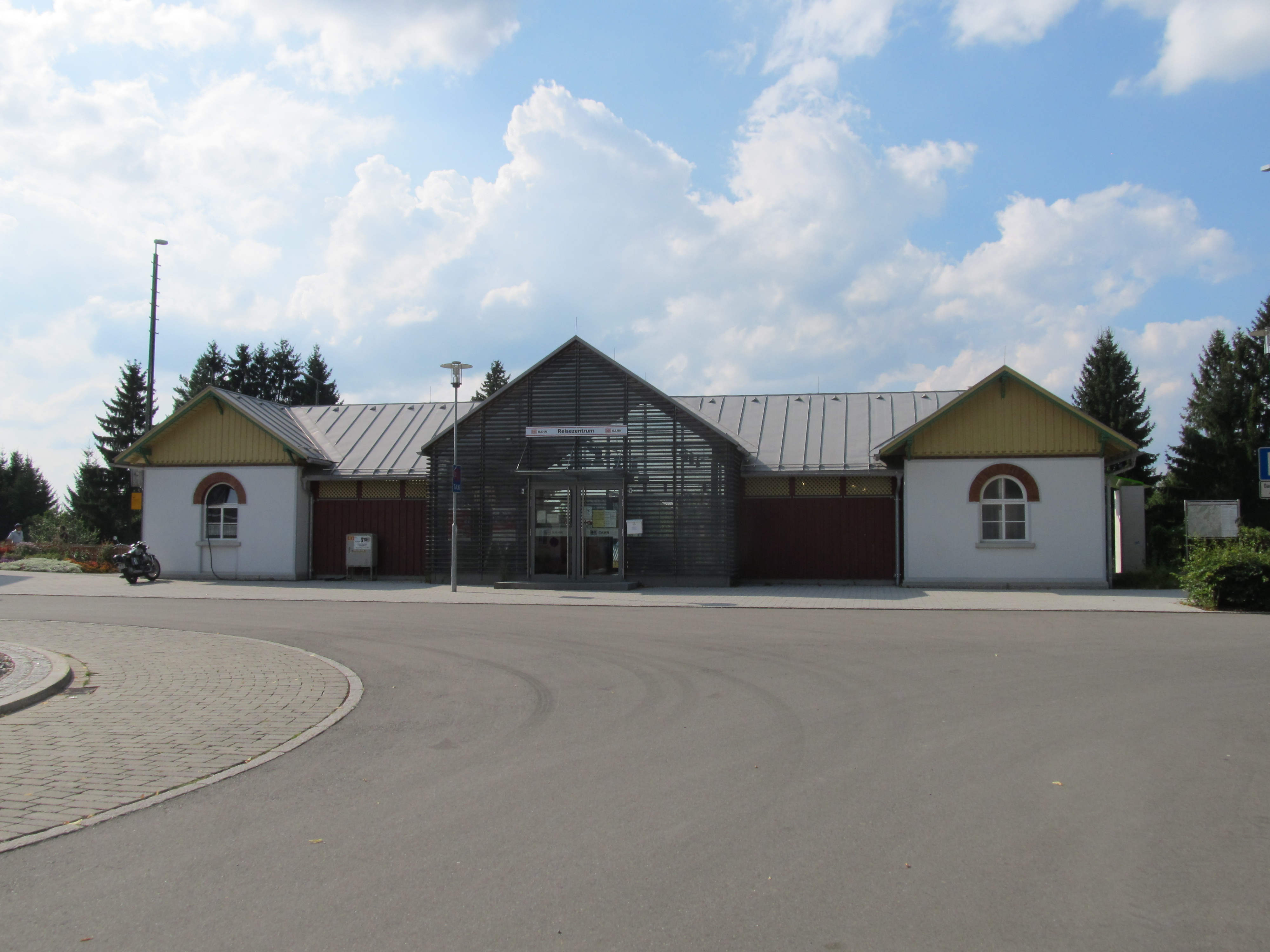 Memminger Nebengebäude des Leutkirchner Bahnhofes